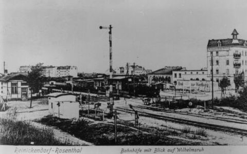 Berlin-Wilhelmsruh: der Bahnhof um 1903 übernommen von [1], Genehmigung des Autors zur Nutzung als Public Domain liegt mir (Mazbln) vor